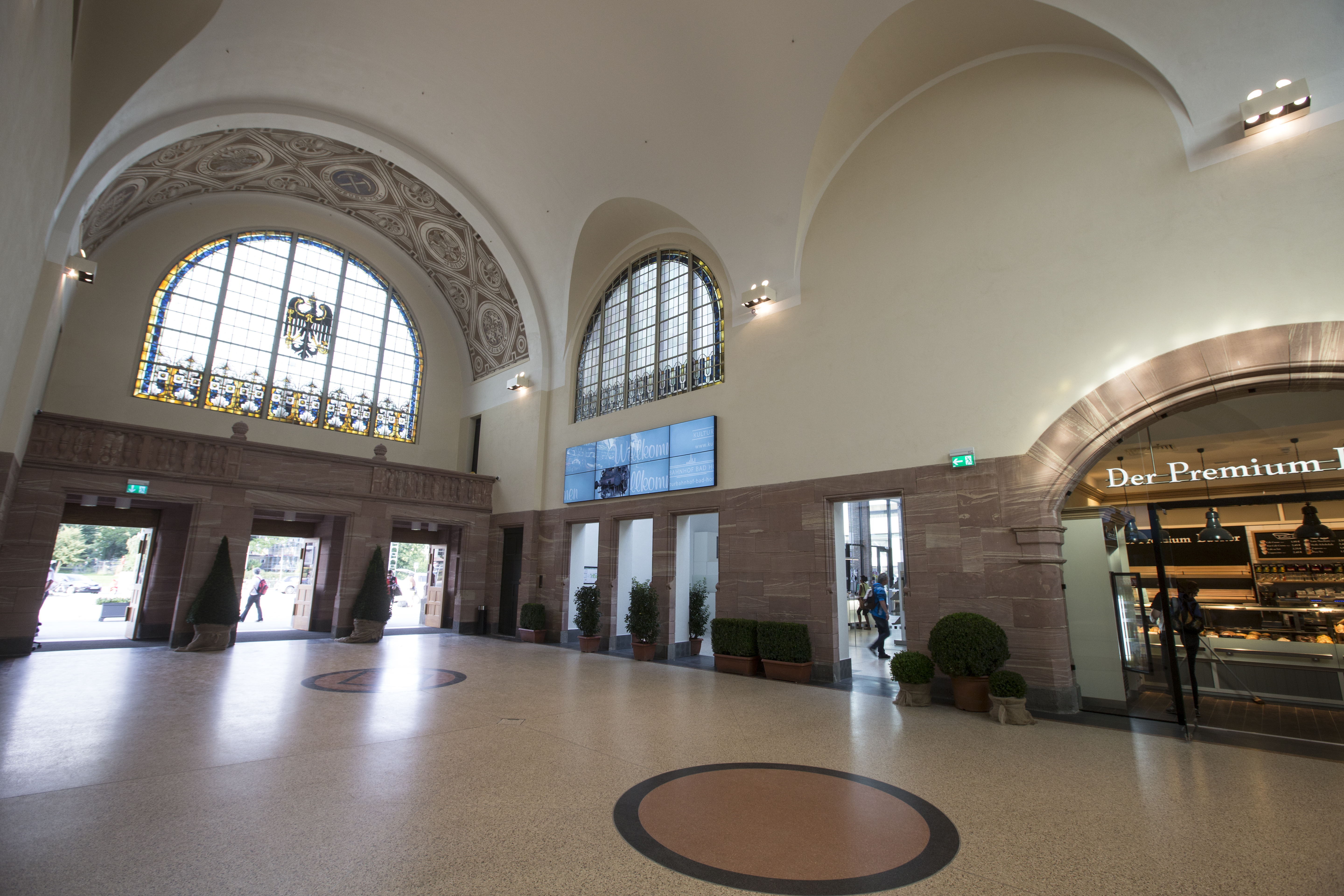 Die restaurierte Haupthalle im restaurierten Bahnhof Bad Homburg. Nach einem Feuer in 2009 wurde das denkmalgeschützte Gebäude Stück für Stück instand gesetzt.